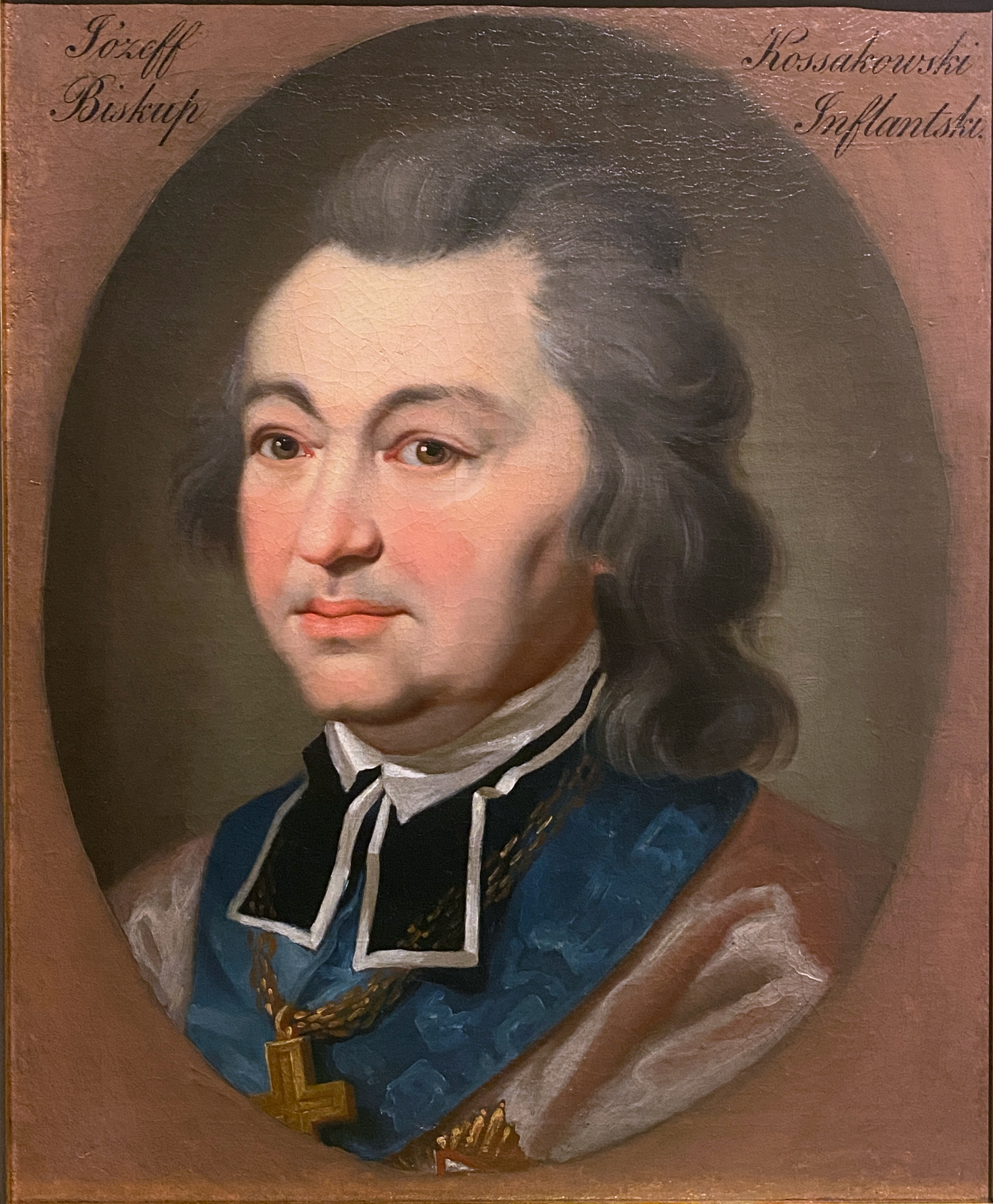 Беларуская (тарашкевіца): Партрэт Юзэфа Казімера Касакоўскага (Juzef Kazimier Kasakoŭski)